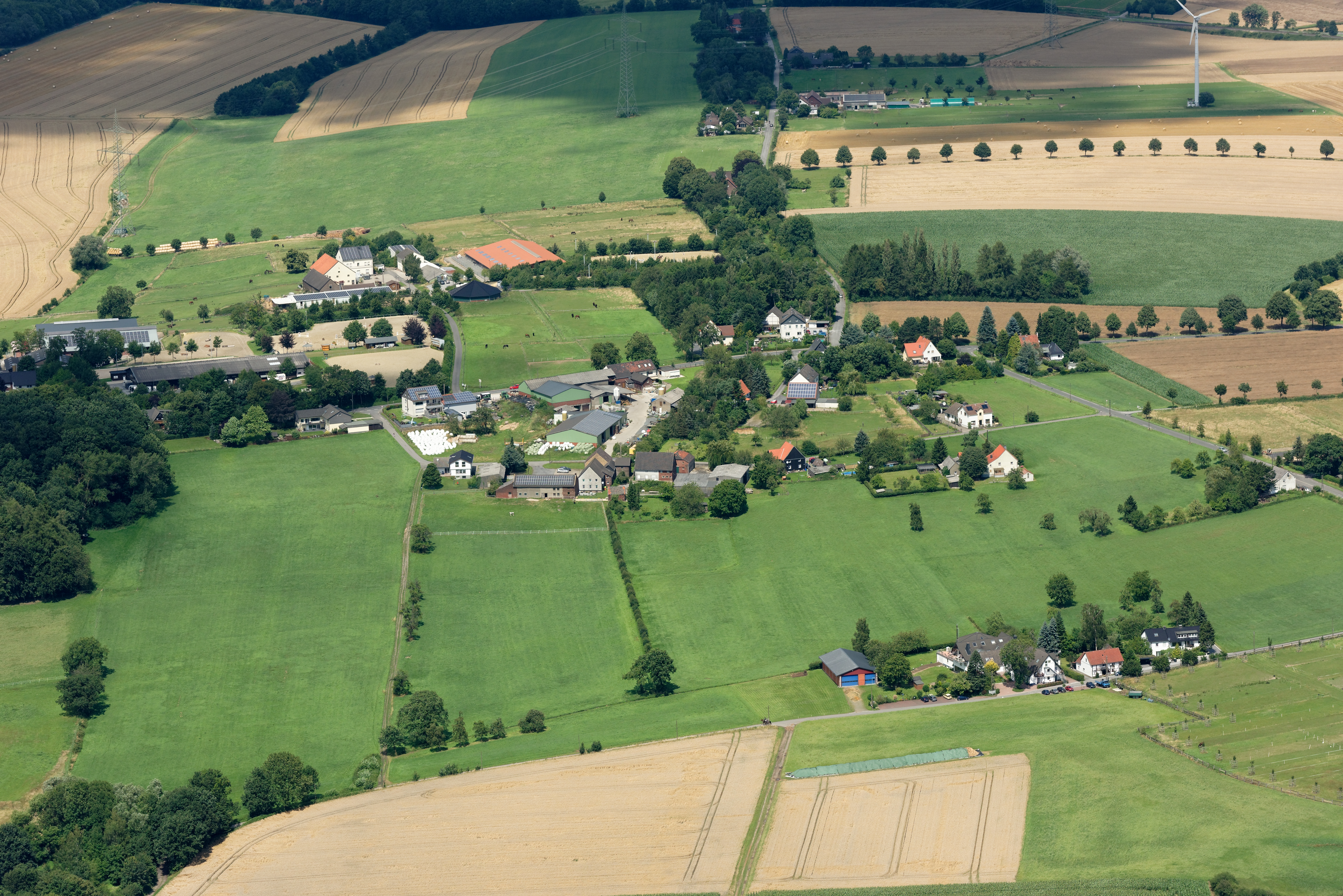 Luftaufnahme: Ortschaft/Weiler Landwehr westlich von Frömern (gehört zum Ortsteil Fröndenberg-Frömern), Blick Richtung Norden, Nordrhein-Westfalen